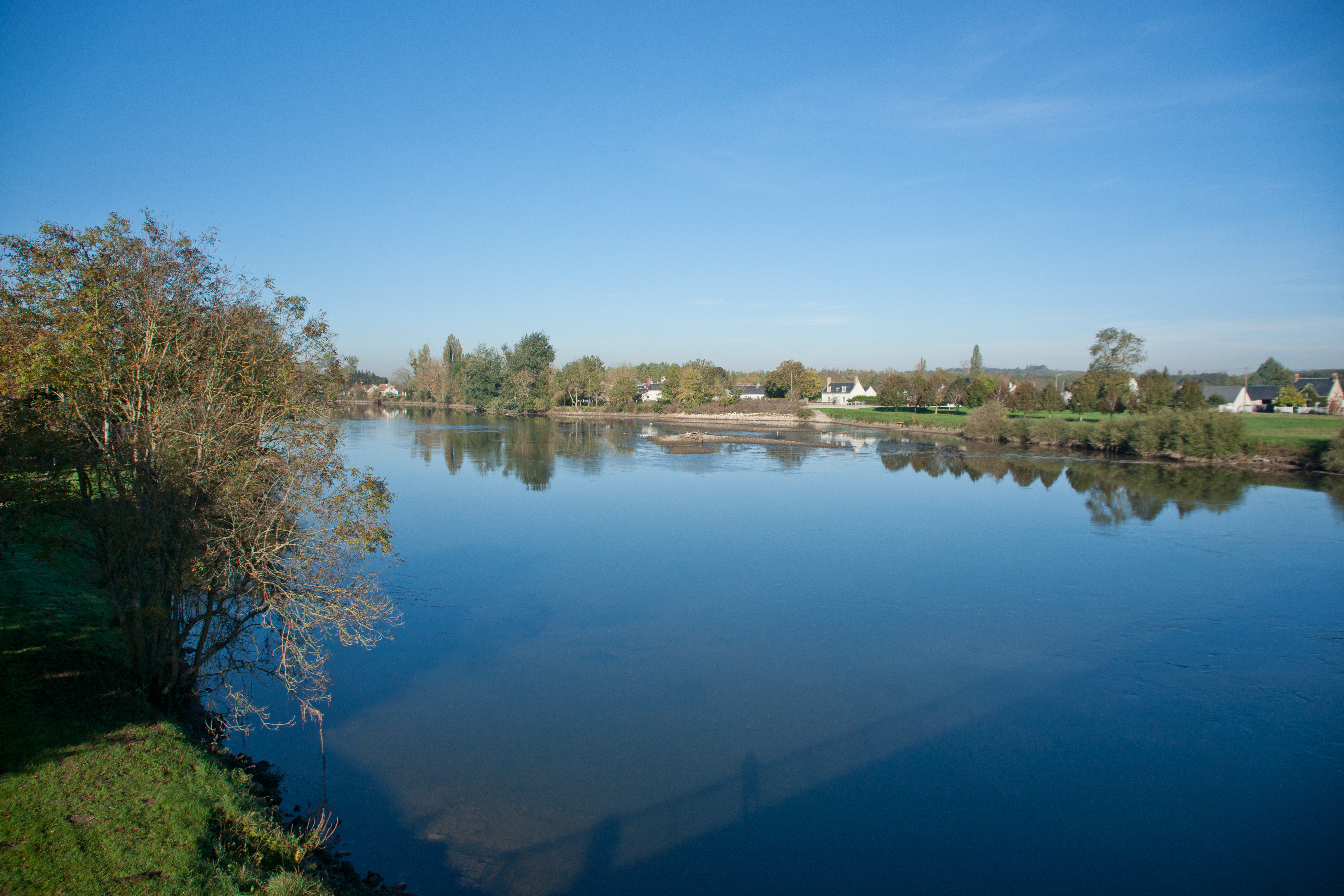 Azay-sur-Cher - le Cher